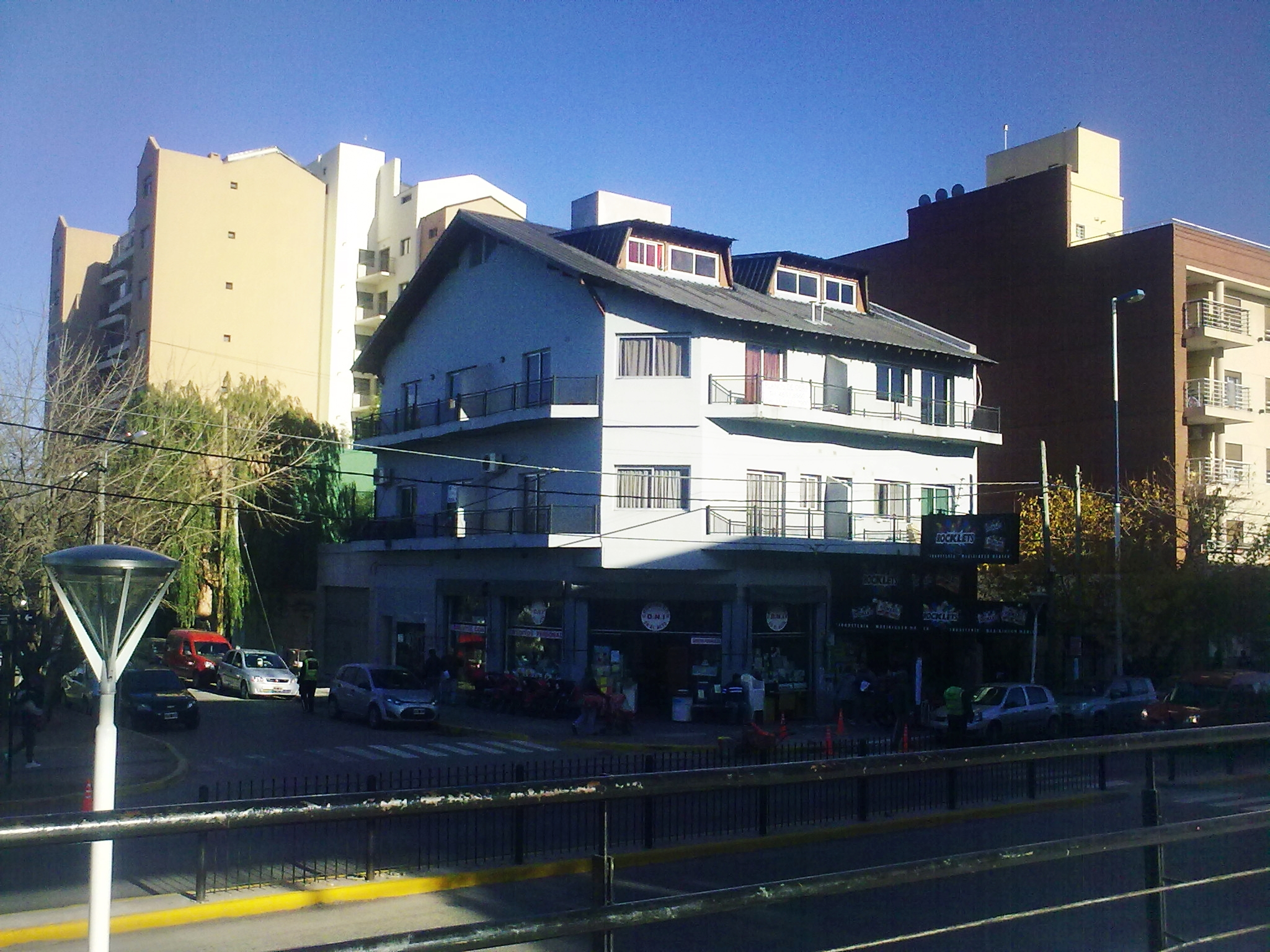 desarrollo de edificios de departamentos en el centro de ezeiza